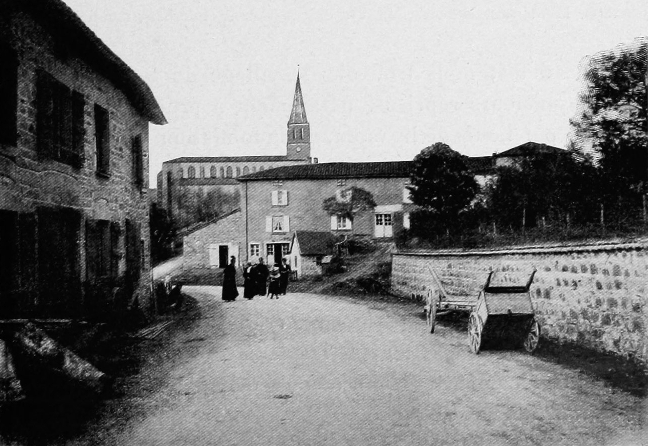 Dictionnaire illustré des communes du département du Rhône. Tome 2 / par MM. E. de Rolland et D. Clouzet.